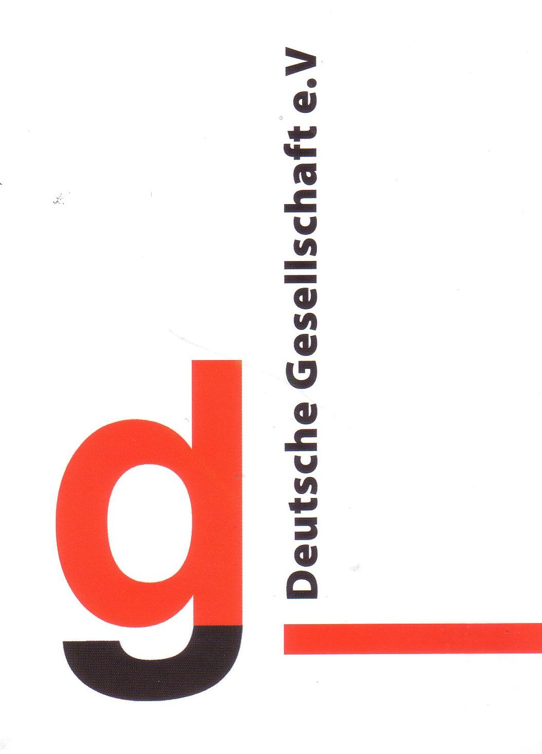 Logo der Deutschen Gesellschaft (Berlin 1990)